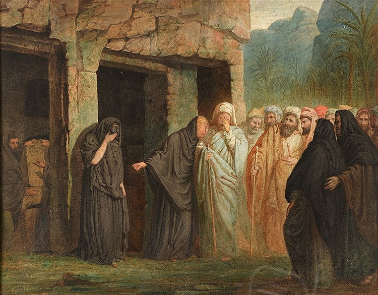 De bewening